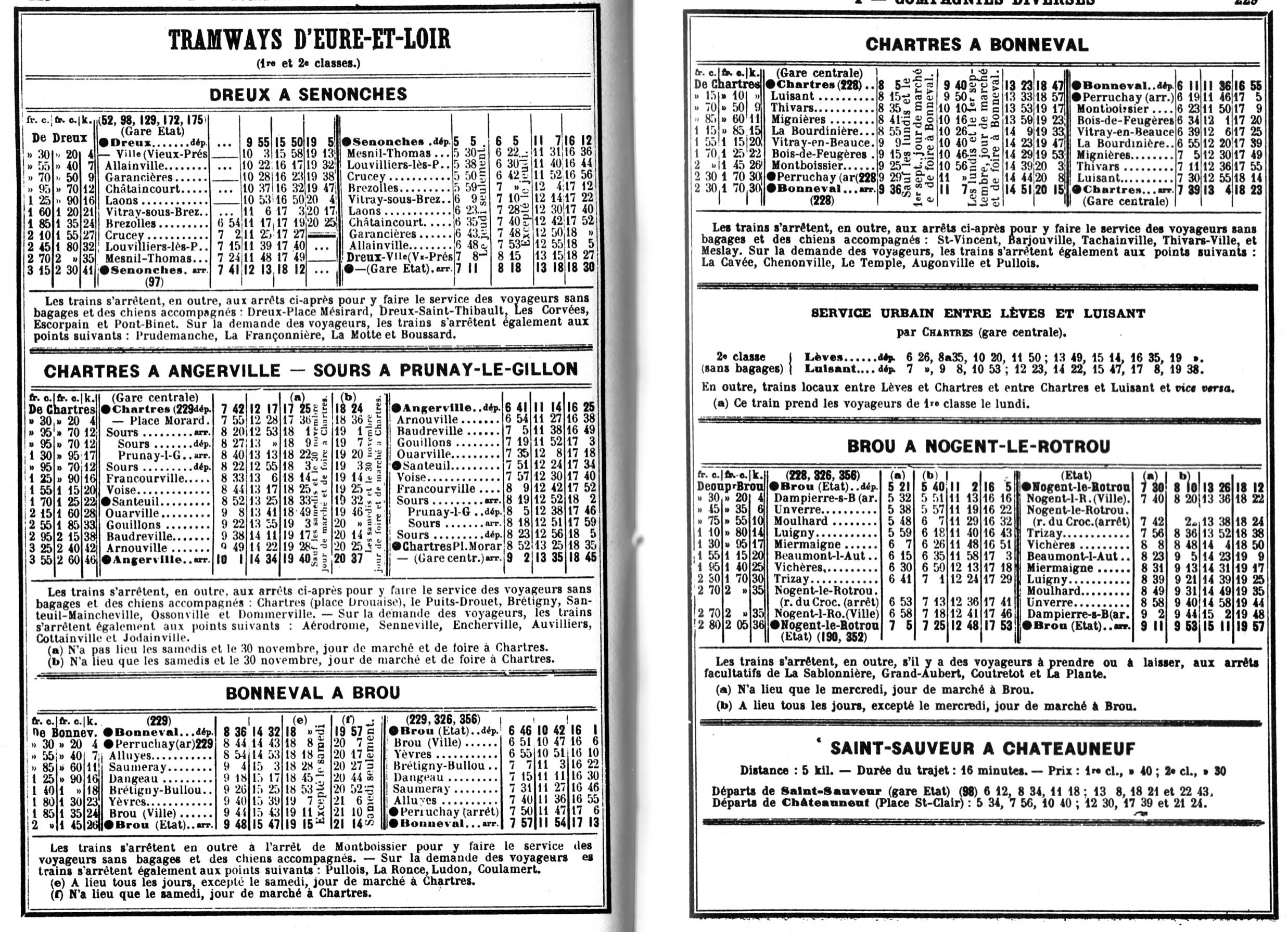 Extrait du Livret Chaix (Mai 1914) : Tramways d'Eure-et-Loir